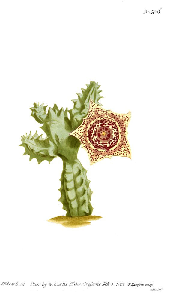 Illustration of Huernia guttata (Orig. Stapelia lentiginosa)